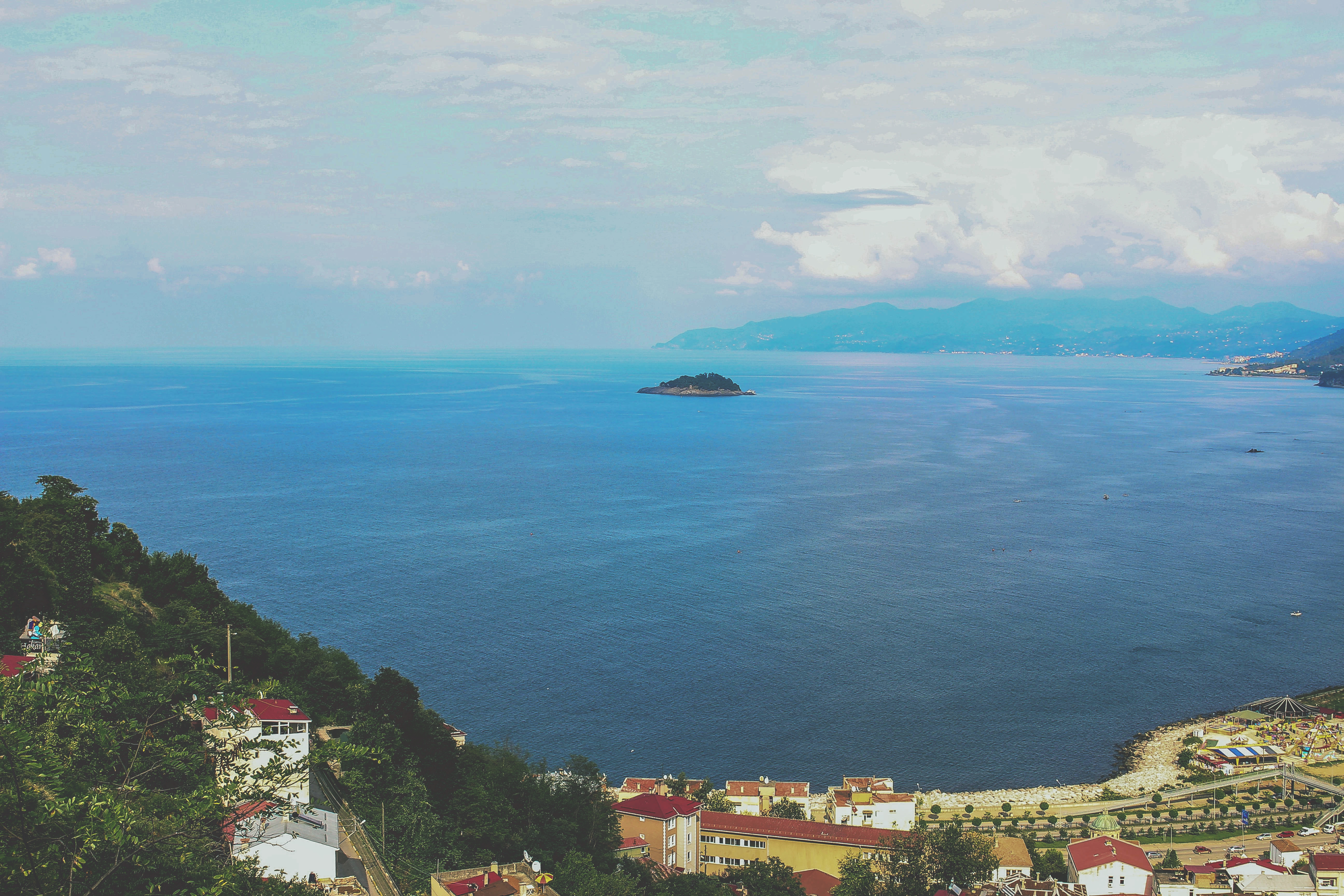 Giresun kalesinden Giresun adasına bakış. Blick auf die Insel von Giresun von der alten Festung aus. View of the Giresun Island from the Giresun Castle.